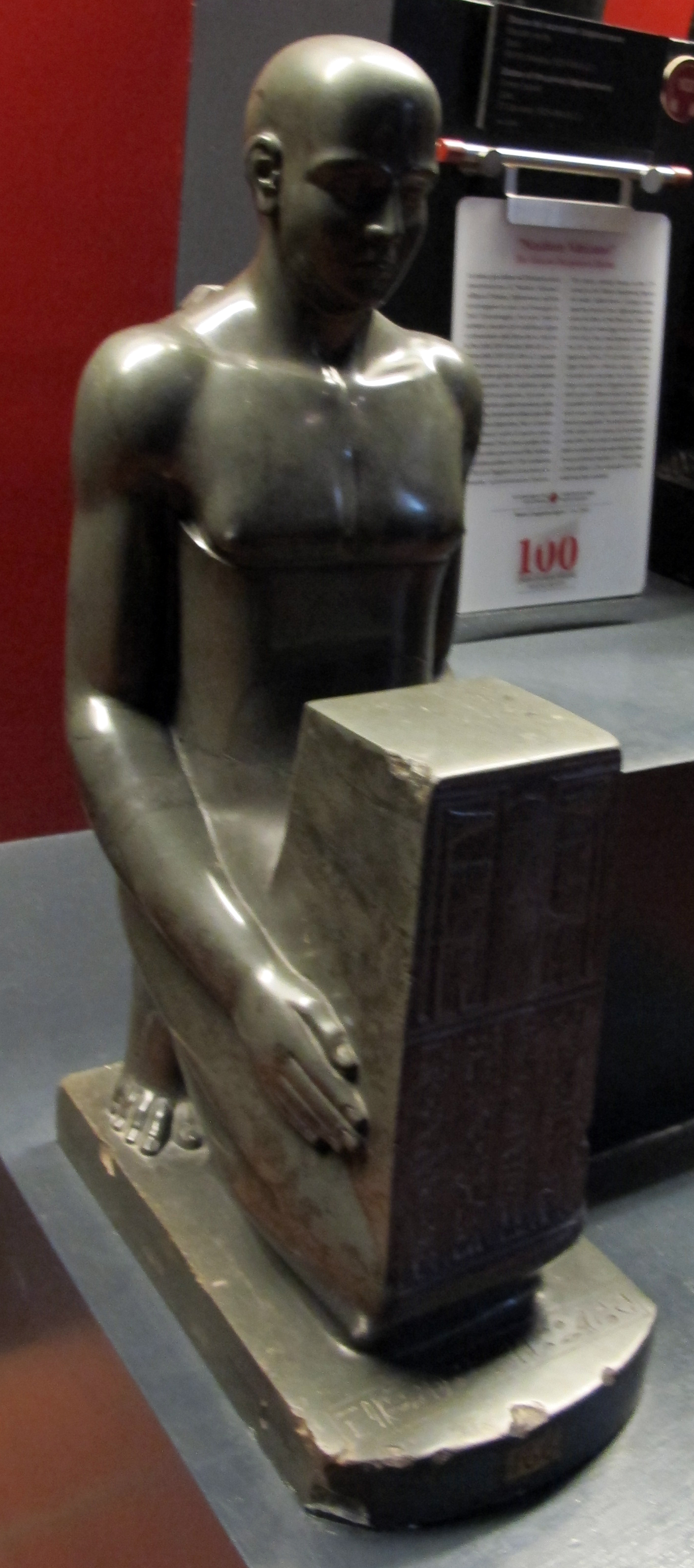 Museo Gregoriano Egizio